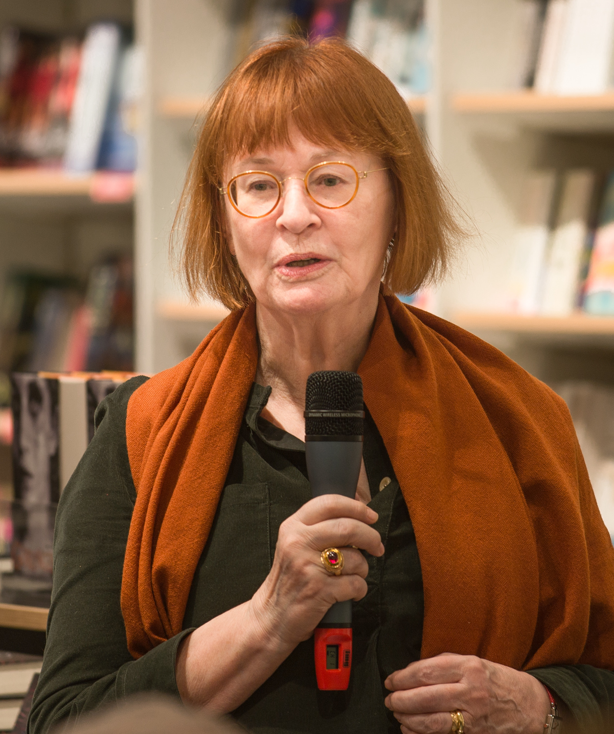 Agneta Stark på Akademibokhandeln i Stockholm den 10 februari 2018 utifrån den aktuella boken "Sanningskonst".